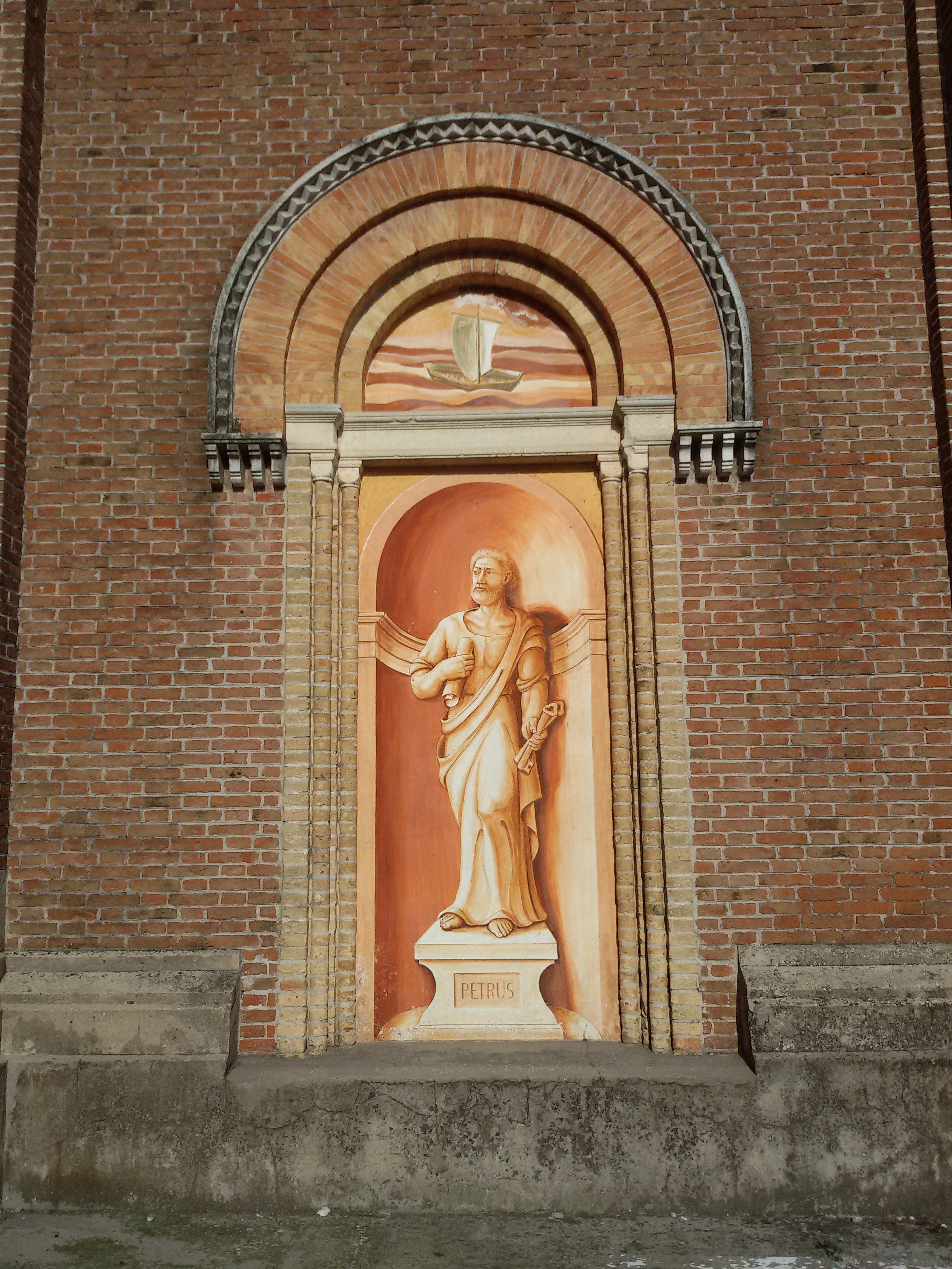 San pietro